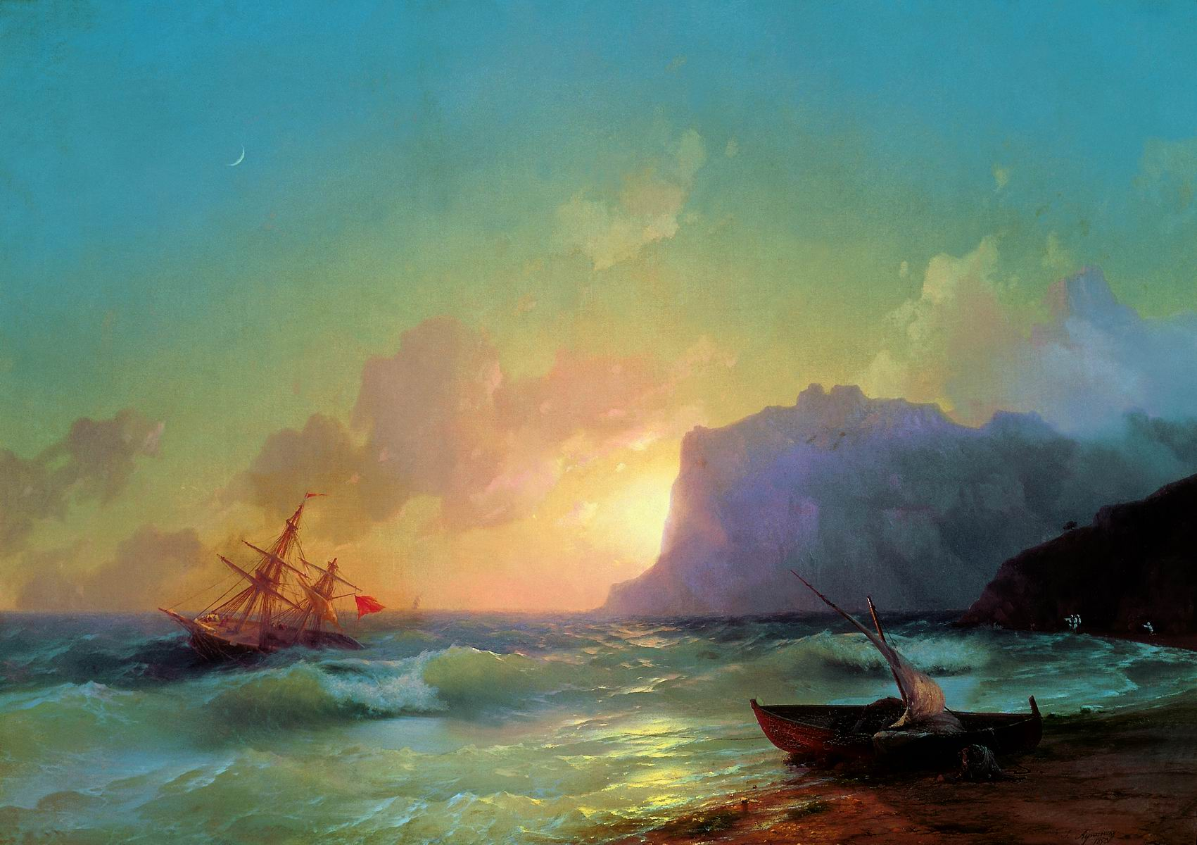 Море. Коктебель. 1853 Холст, масло. 82,5х118см. Феодосийская картинная галерея им. И.К. Айвазовского, Феодосия